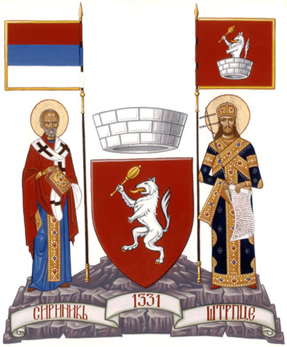 Грб општине Штрпце